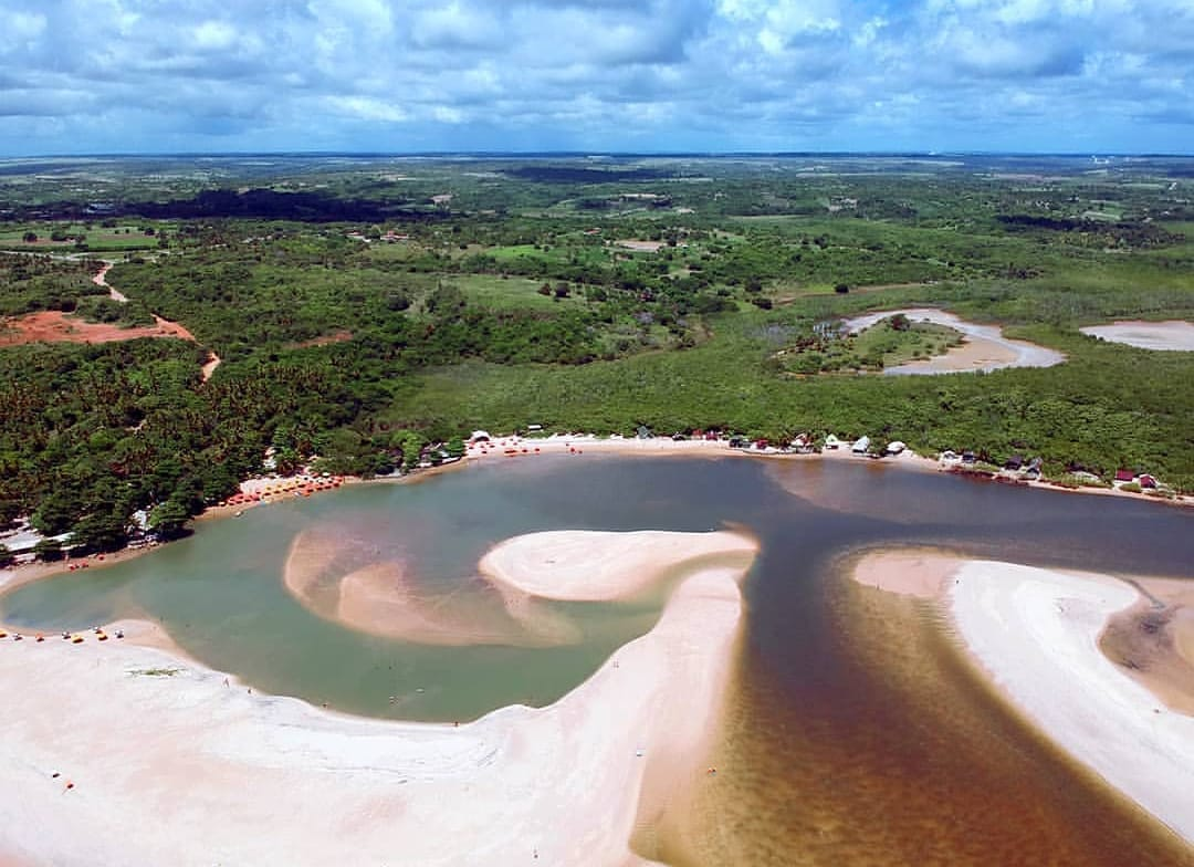 divisa entre conde e capital paraibana